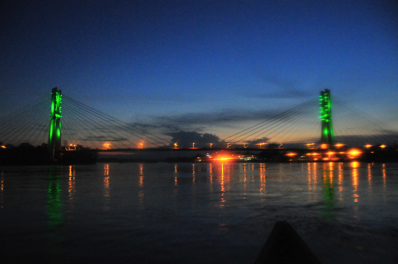 Vista nocturna de Francisco Orllana, El Coca